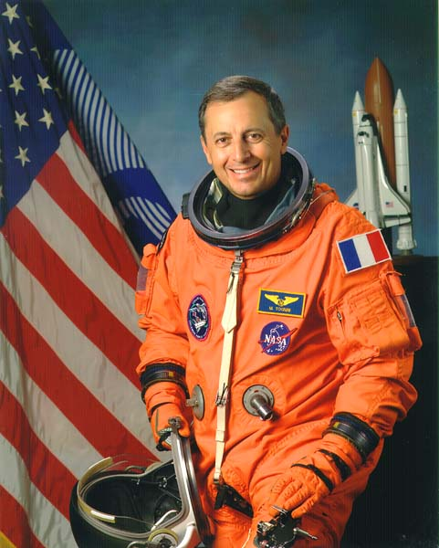 portrait astronaut Michel Tognini